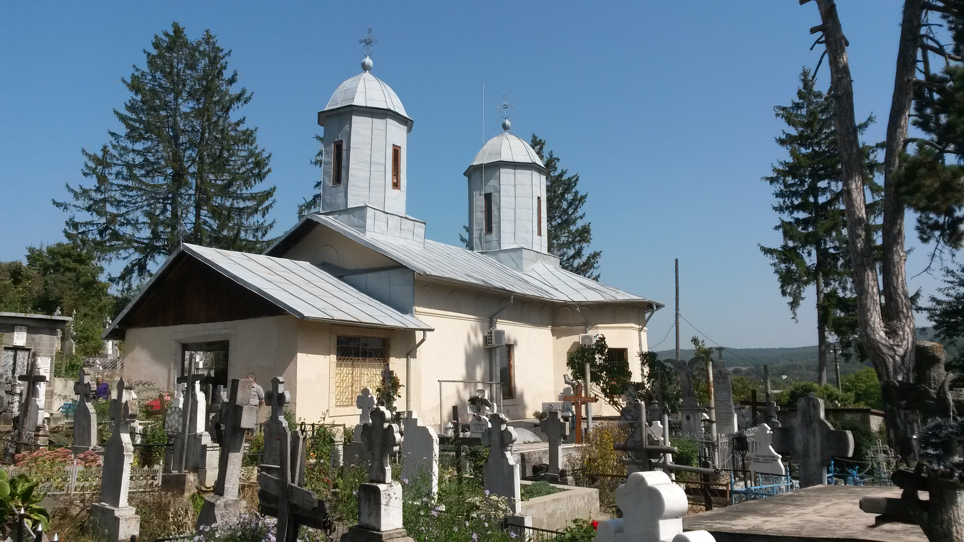 Biserica „Adormirea Maicii Domnului”, „Sf. Dimitrie” - Stavropoleos